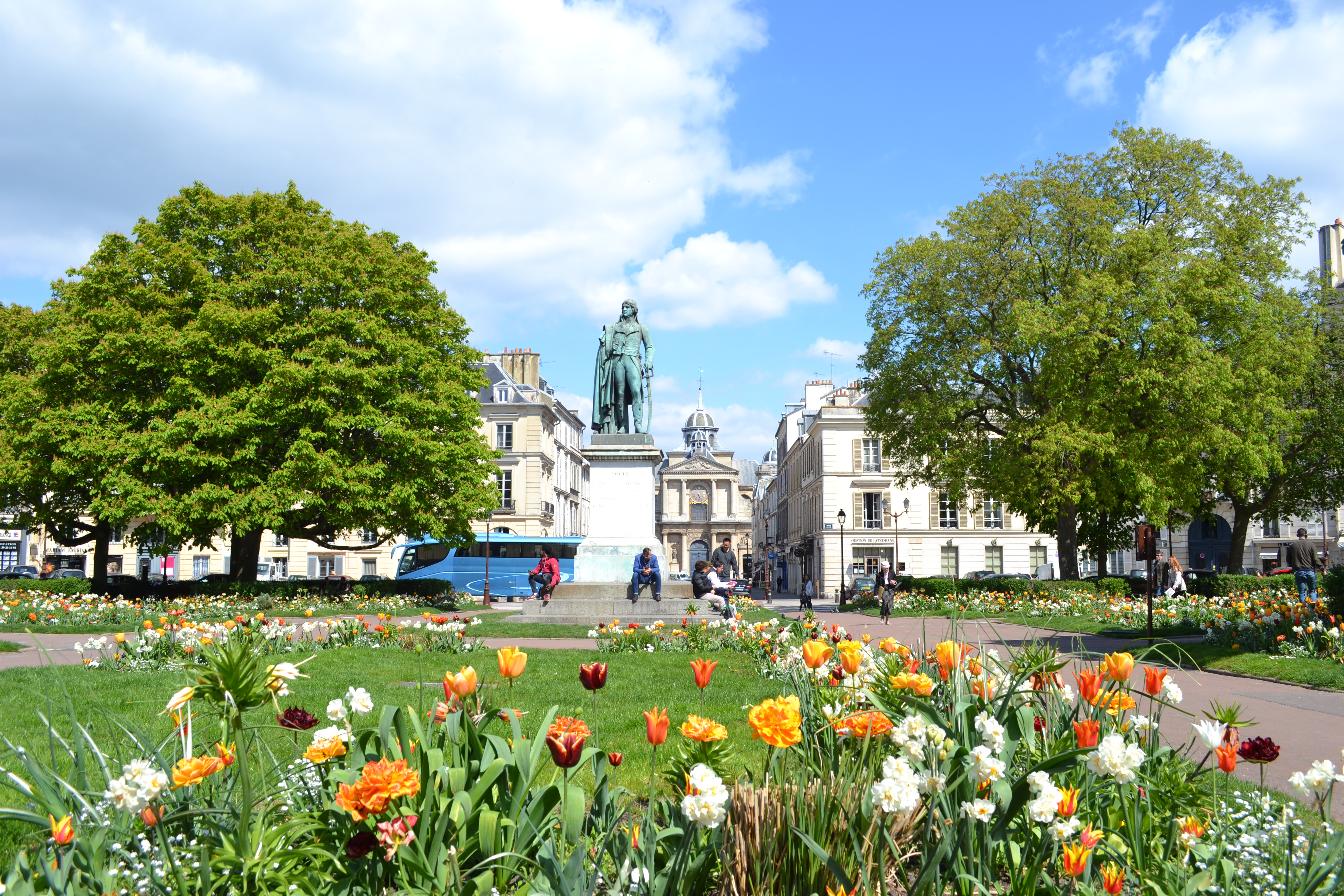 Statue de Lazare Hoche, sur la place Hoche à Versailles (Yvelines)